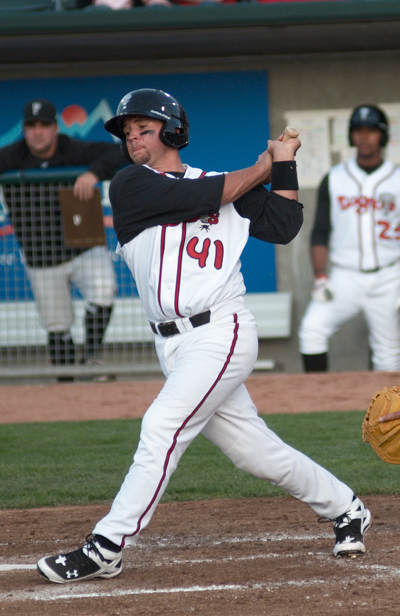 ショーン・オチンコ